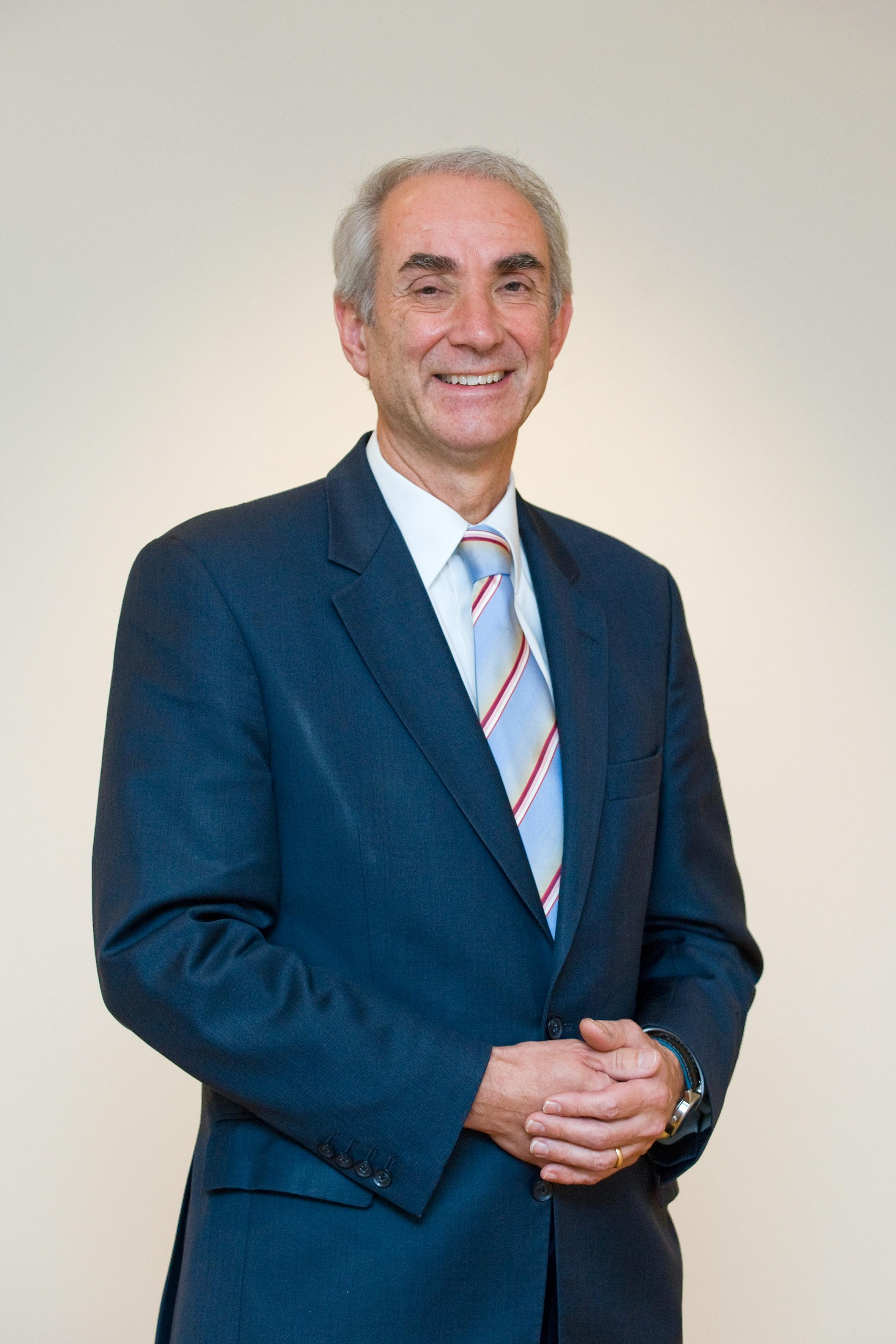 Minister voor Immigratie, Integratie en Asiel Gerd Leers